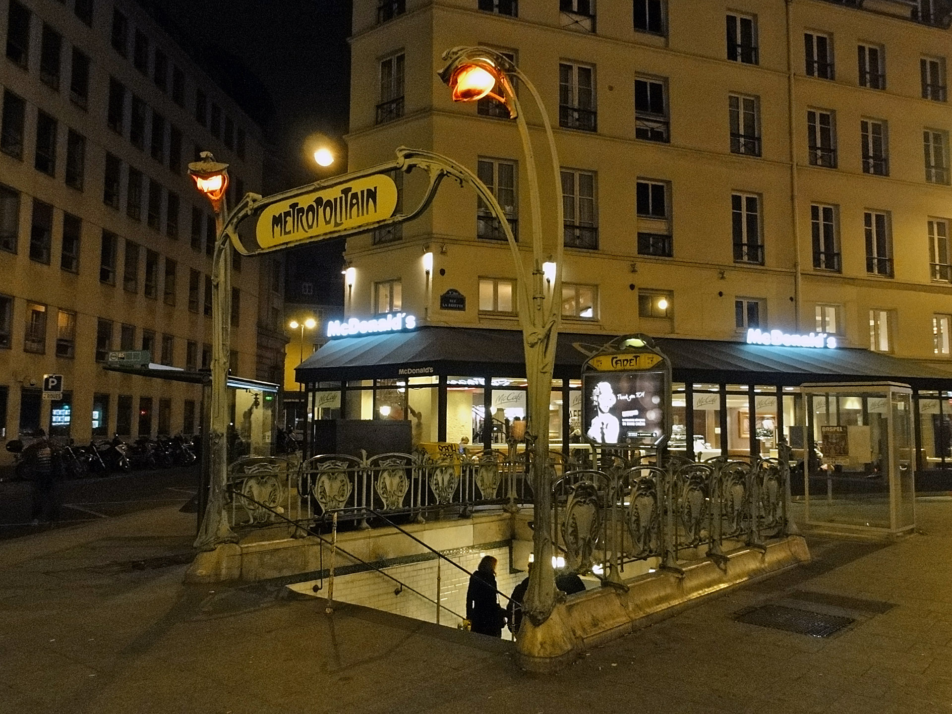 Station Cadet de la ligne 7 du métro de Paris, France.